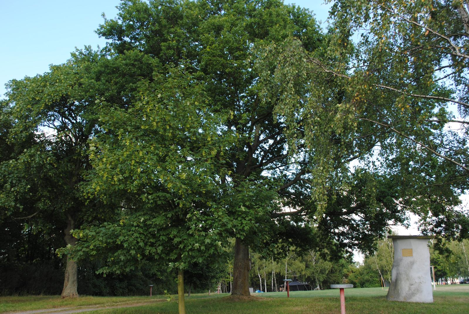 Stelzenbaum auf der Anhöhe in Stelzen mit Stumpf des alten Baumes, welcher im Sturm am 18.März 1897 abgebrochen ist.